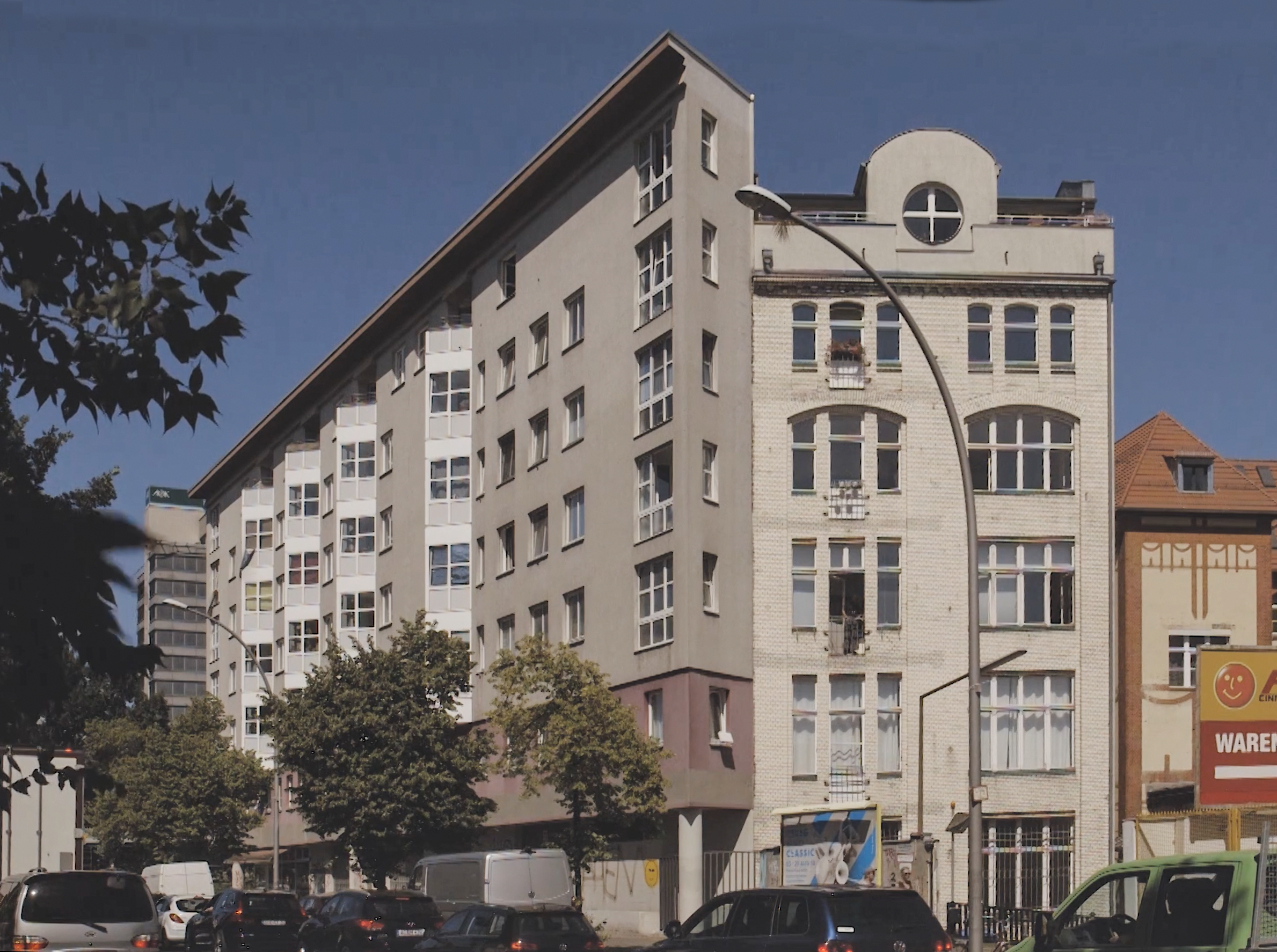 Apartmenthaus Mehringdamm